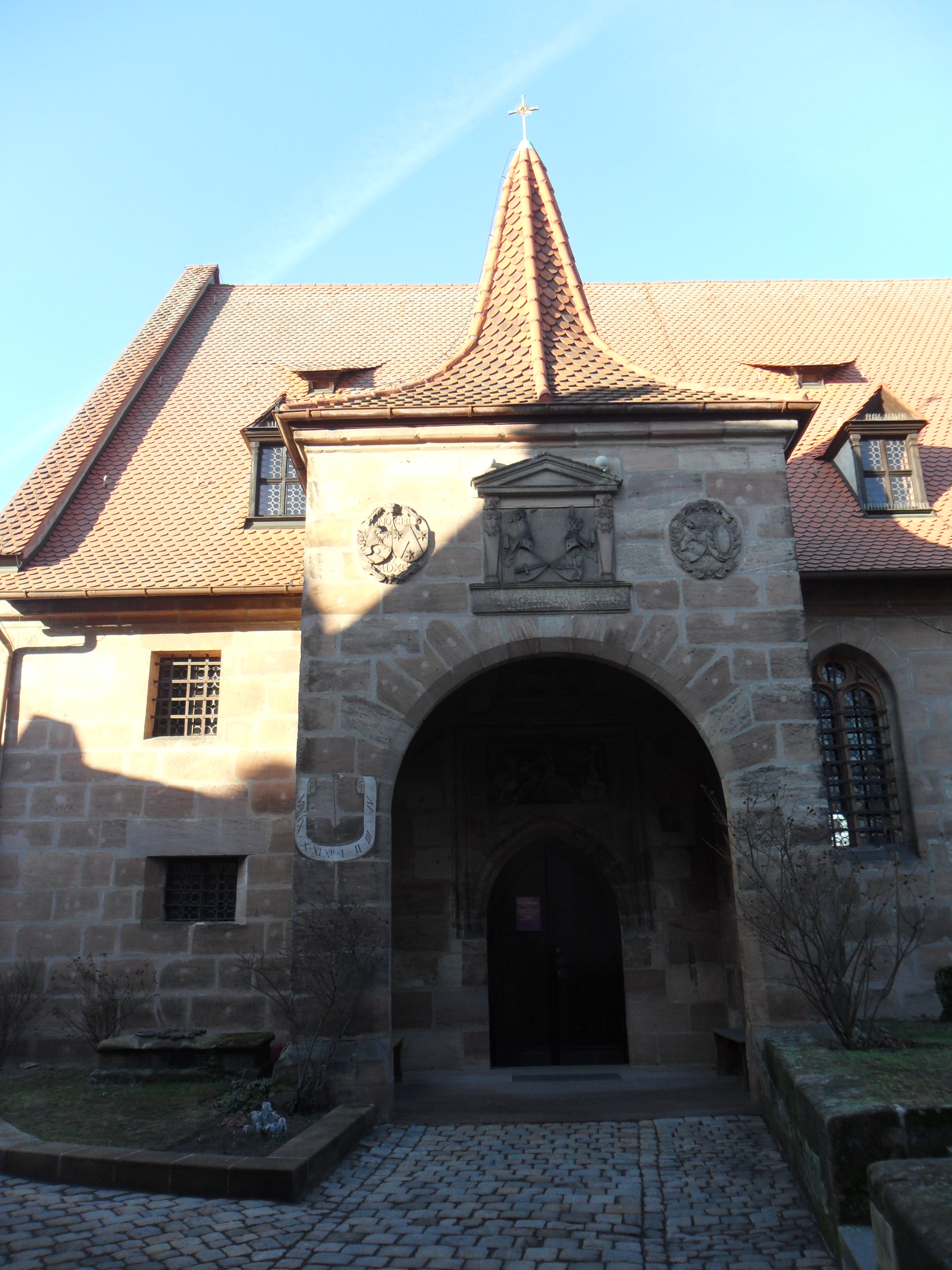 siehe Bildtitel